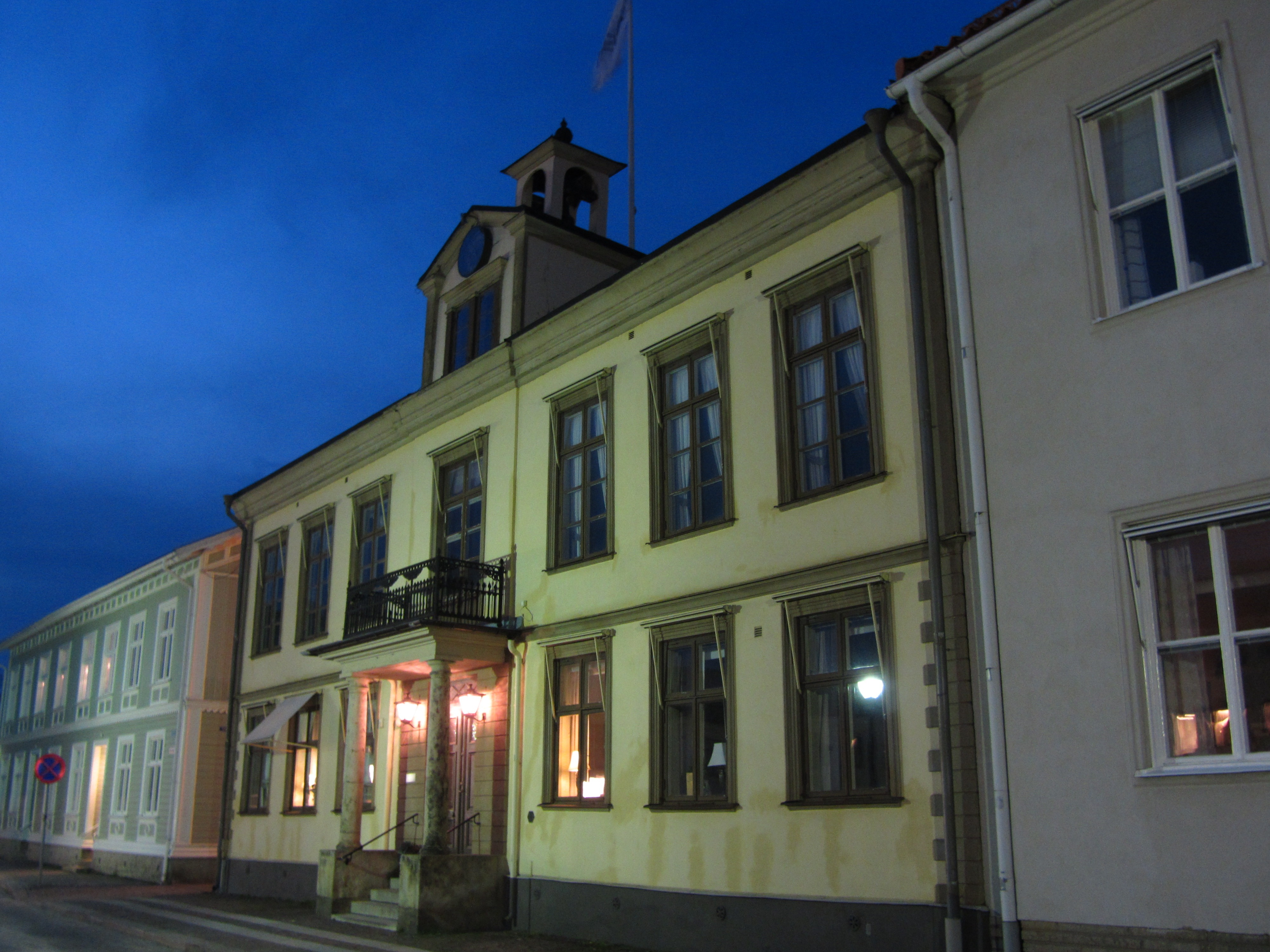 Stortorget och rådhuset i Skara.